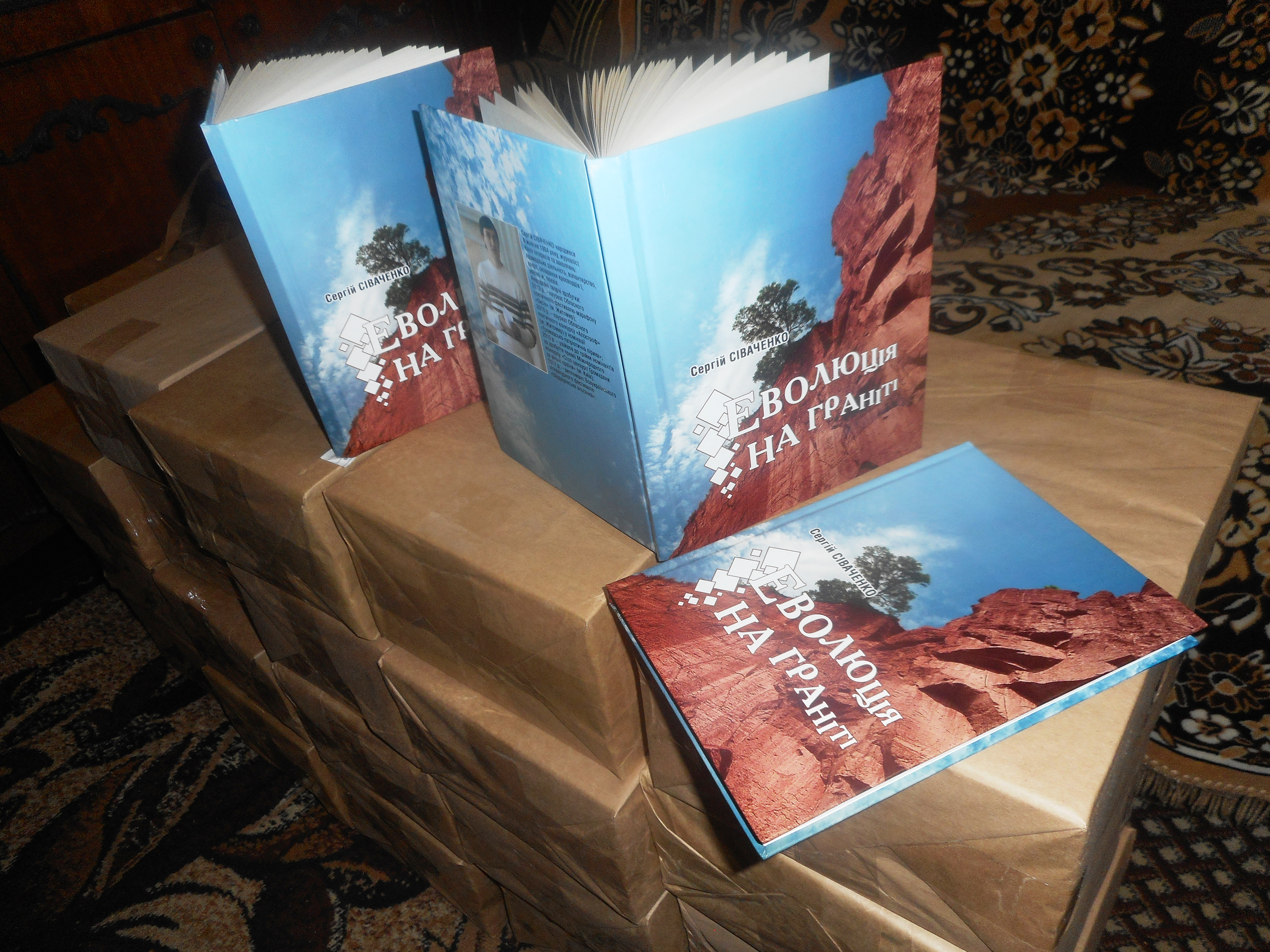 Сергій Сіваченко з книгою "Еволюція на граніті" став лауреатом та переможцем кількох Всеукраїнських літературних конкурсів та премій протягом 2018-19 рр.